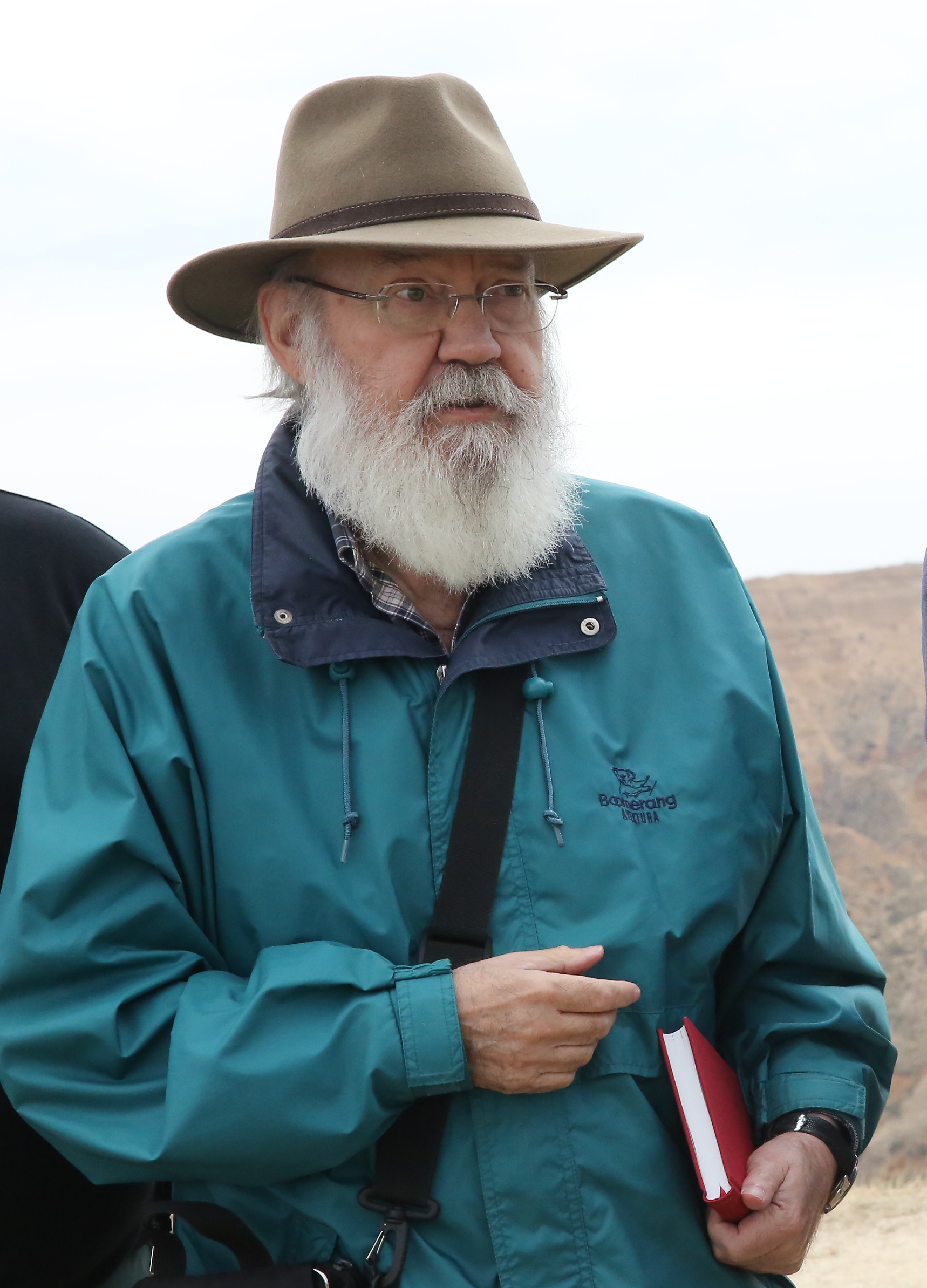 BURUJÓN (Toledo), 17 de octubre de 2017.- El consejero de Agricultura, Medio Ambiente y Desarrollo Rural, Francisco Martínez Arroyo, asiste, en el Monumento Natural de Las Barrancas, al rodaje de la película ‘Tiempo Después’, del director de cine albaceteño José Luis Cuerda.(Fotos: Ignacio López // JCCM)